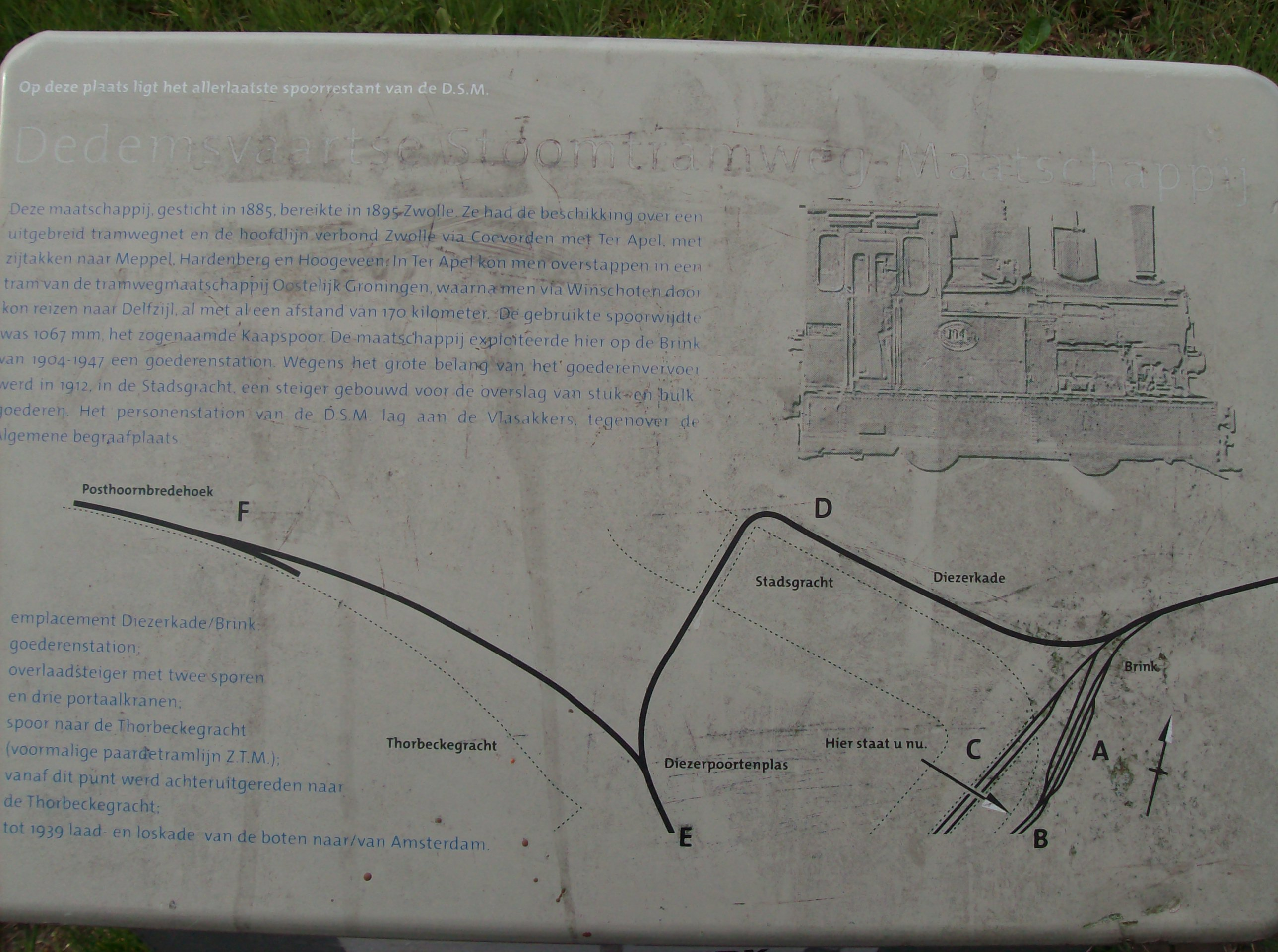 Informatiebord Dedemsvaartsche Stoomtramweg Maatschappij in Zwolle